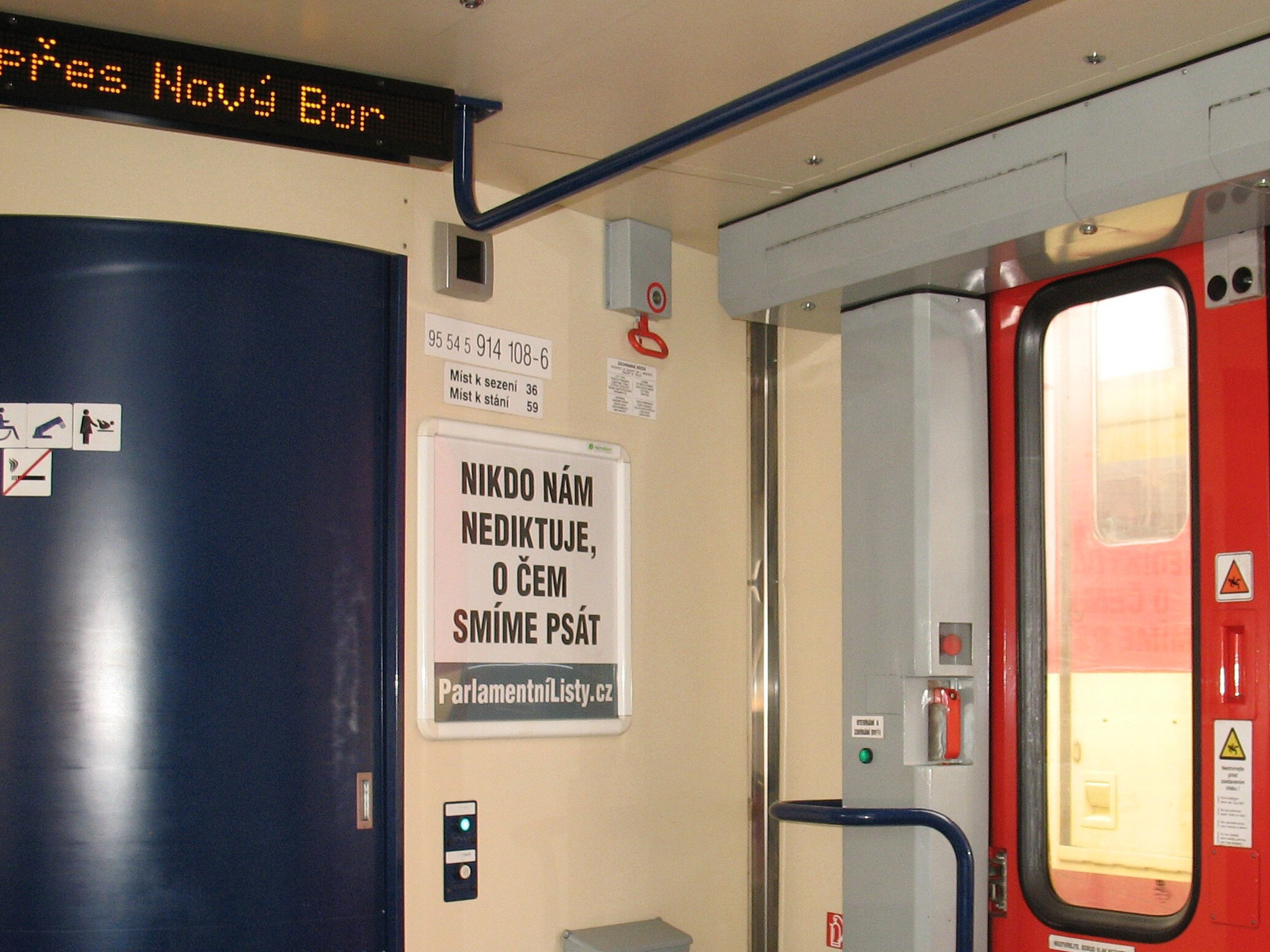 Reklama na Parlamentní listy, únor 2016